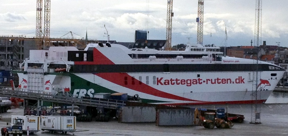 Katemaran-færgen Dolphin Jet (IMO 9279264) fra Kattegat-ruten. Her ved kaj i Aarhus Havn.